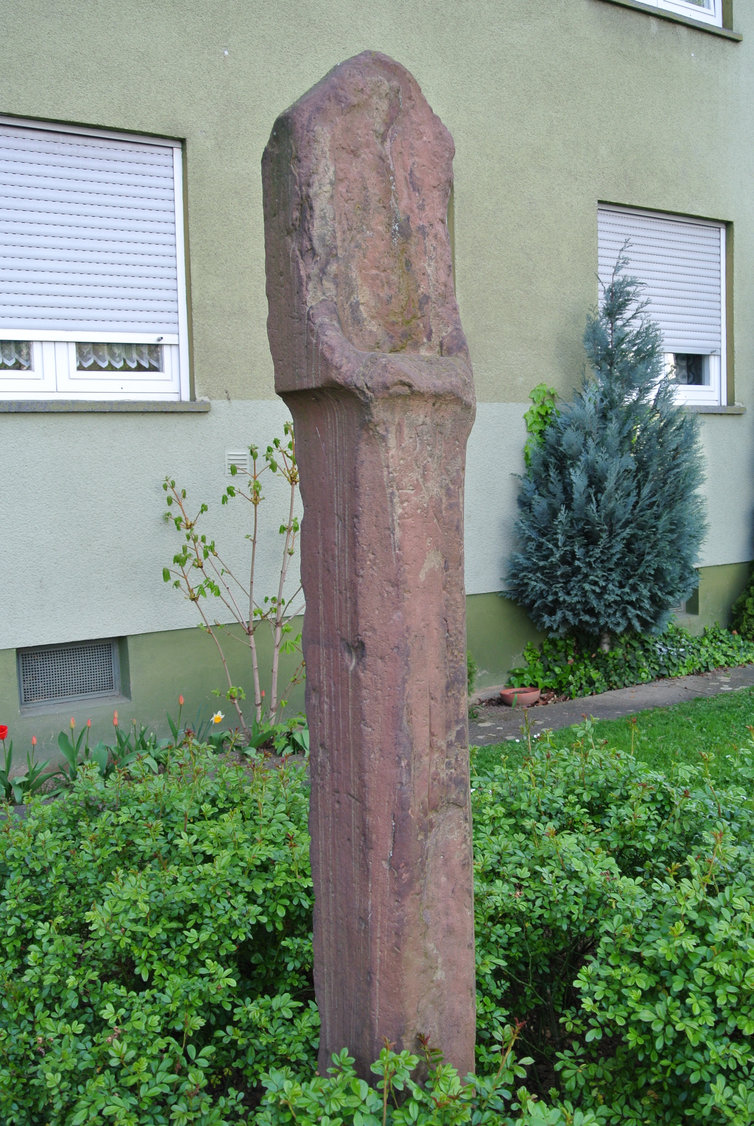 Spätgotischer Heiligenstock von 1516 in Frankfurt-Eckenheim, Homburger Landstraße 87, Kulturdenkmal